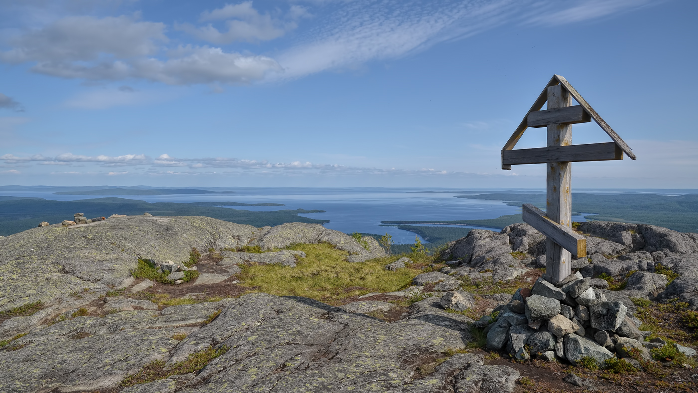 Паанаярви: Западная граница национального парка совпадает с государственной границей России с Финляндией. Со стороны финской границы к “Паанаярви” примыкает национальный парк “Оуланка”,Лоухский район, This image is related to the protected area of Russia number 1000069